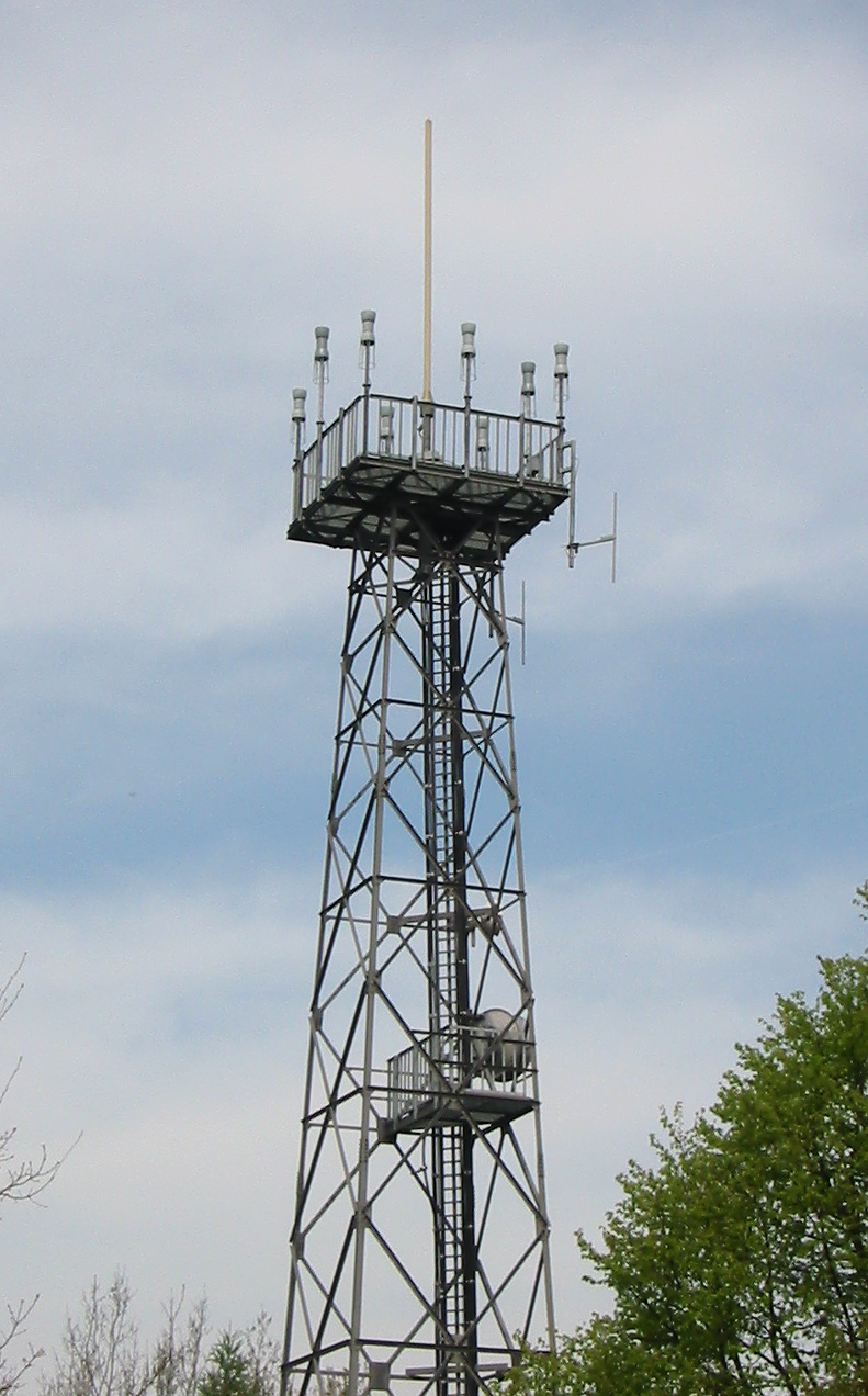 Typische Bodenstation für Flugfunk der DFS auf dem Deister bei Hannover